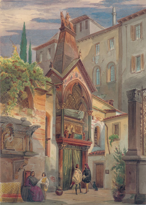 Ansicht der Scaliger-Gräber in Verona, Aquarell, 31 x 25,5 cm